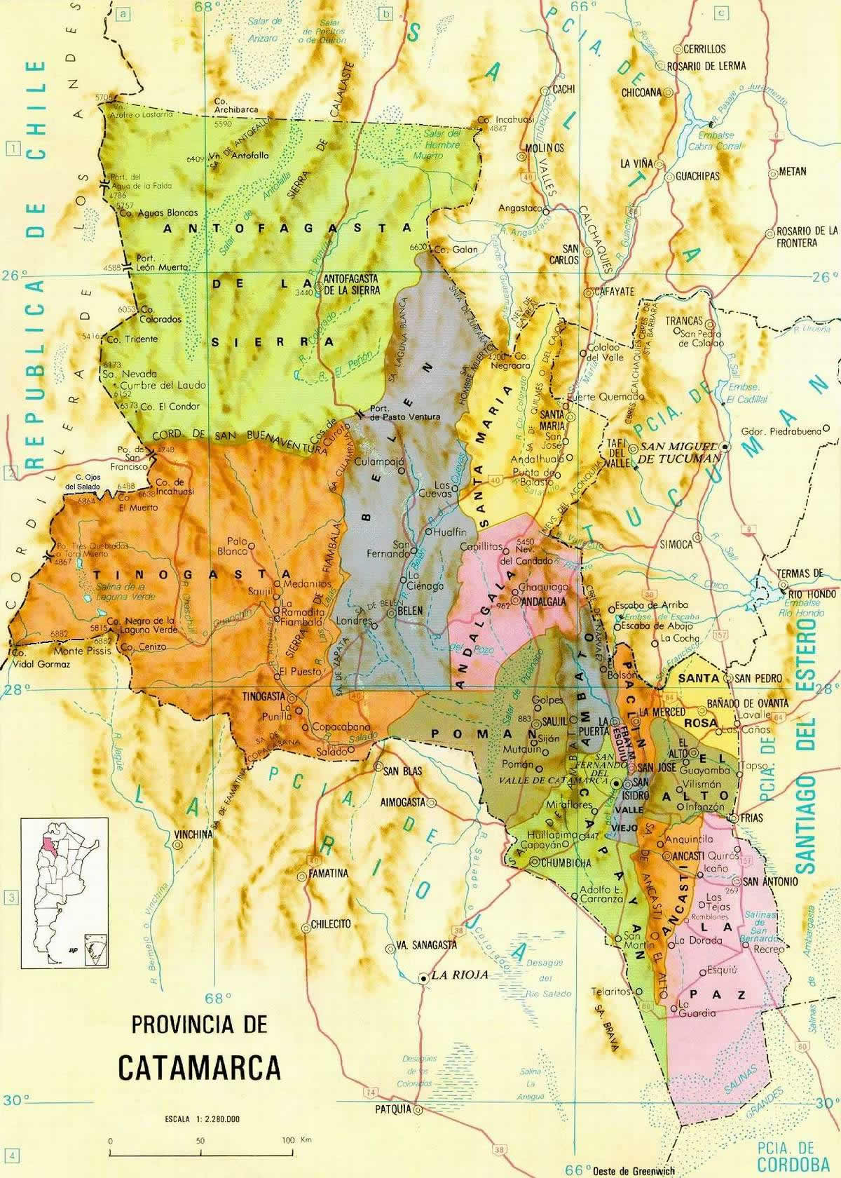 Mapa Fisico-Politico de Catamarca